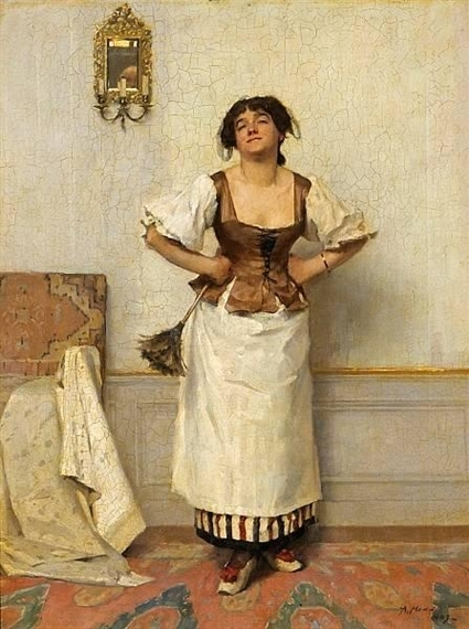 Soubrette